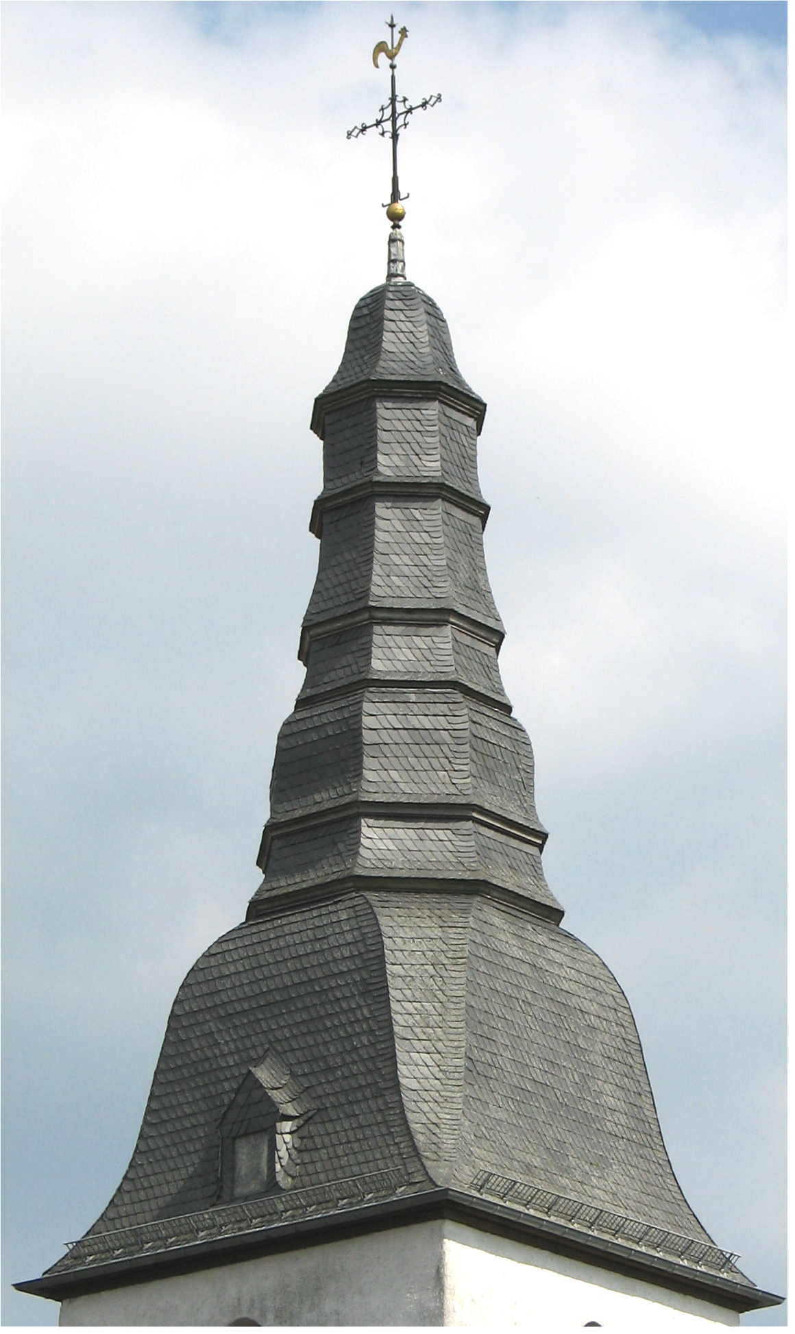 Sujet : Daach vun der Hubertuskapell vu Weweler Source : Eege Foto Johnny Chicago Lizenz